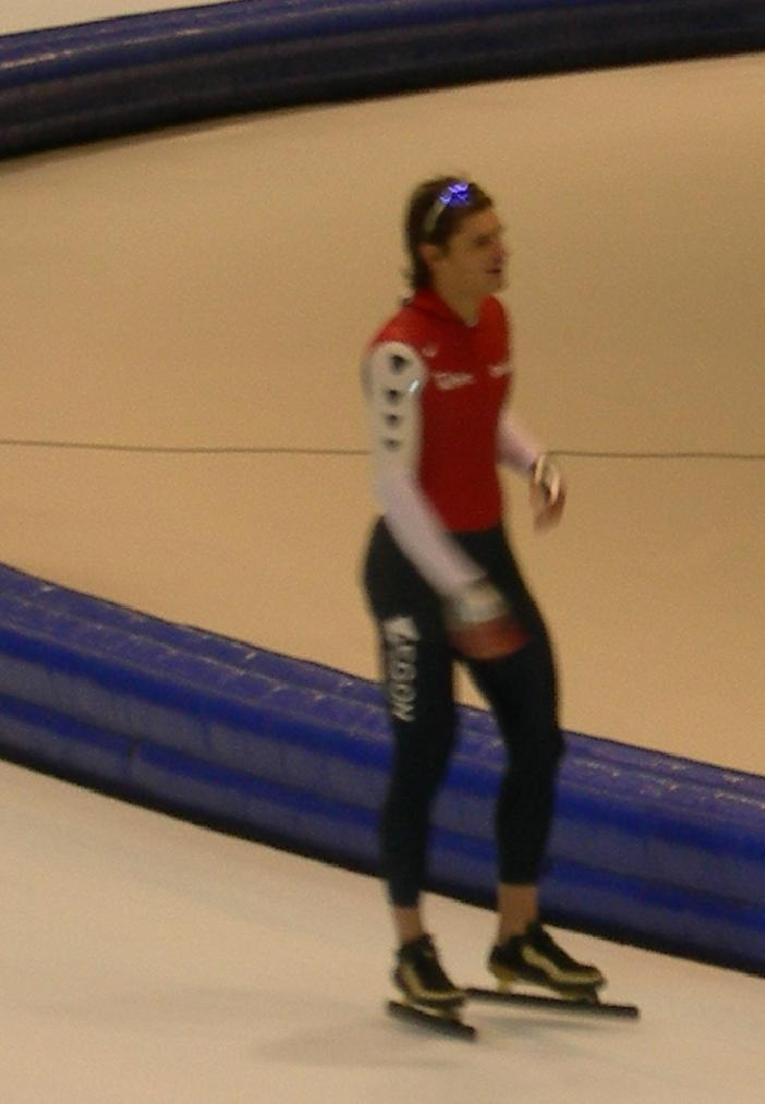 Zelfgemaakte foto tijdens het WK Sprint 2006 in Thialf